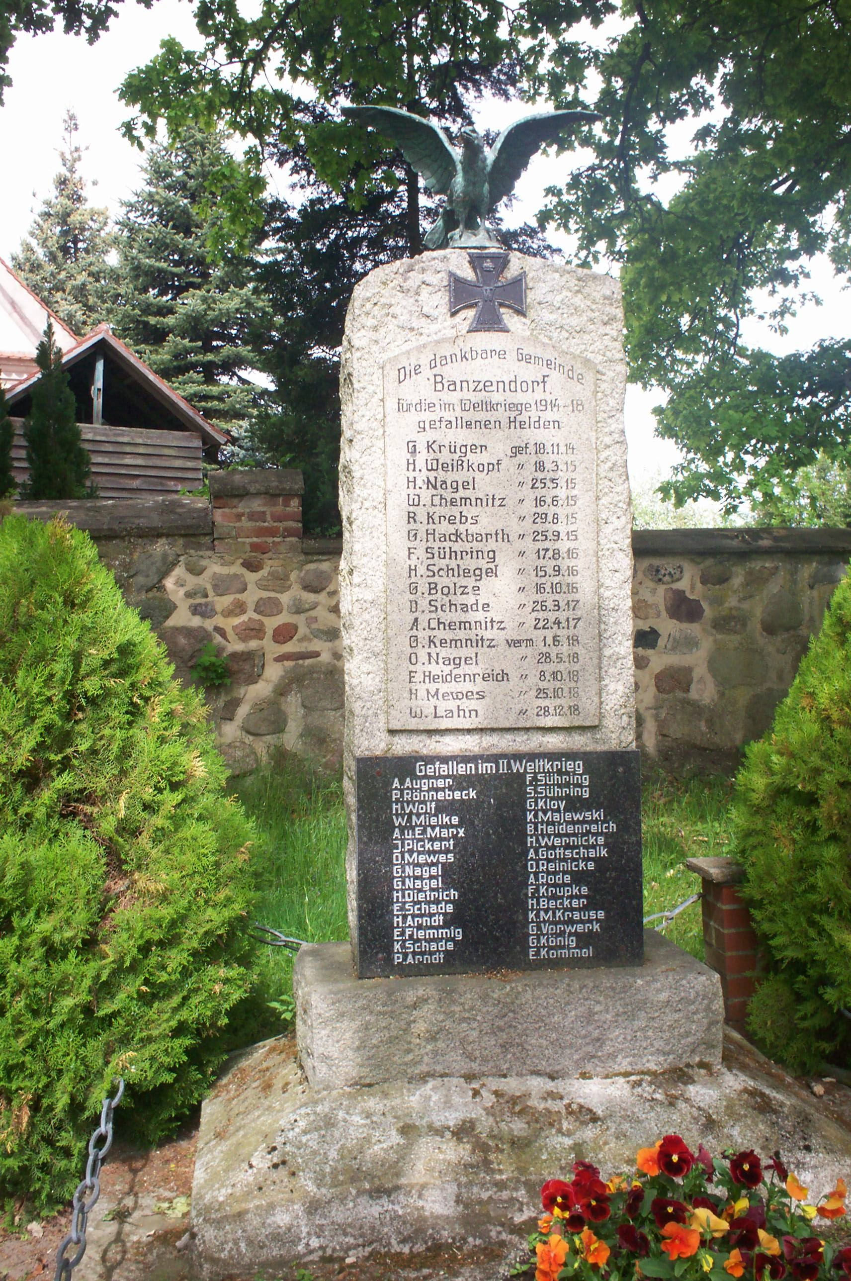 Banzendorf Nr. 71, Denkmal für die Gefallenen des I. und II. Weltkrieges